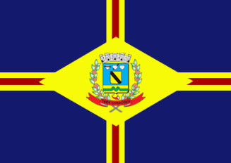 Bandeira oficial de Três Corações, Minas Gerais.